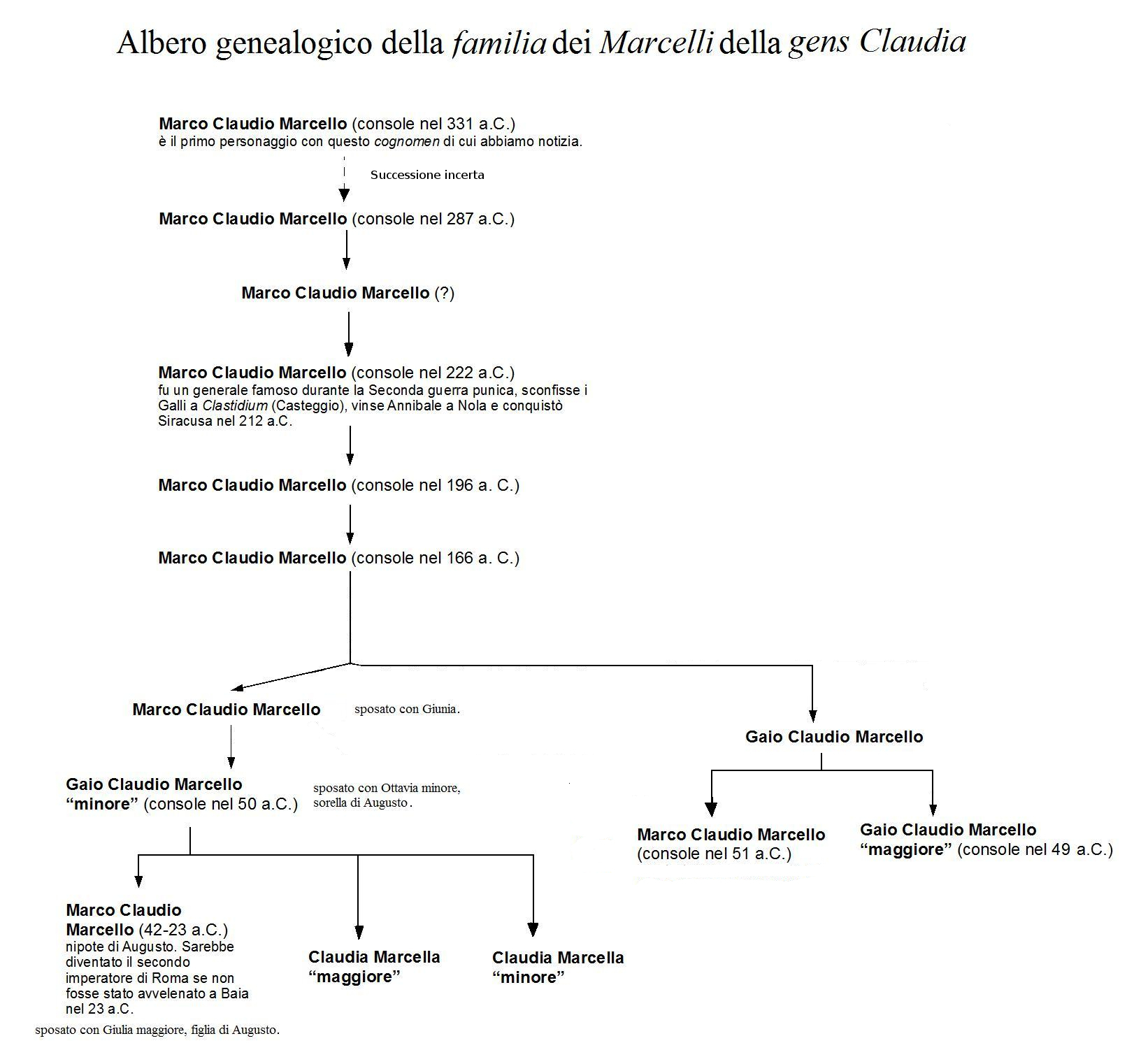 Albero genealogico della familia romana con cognomen "Marcello".